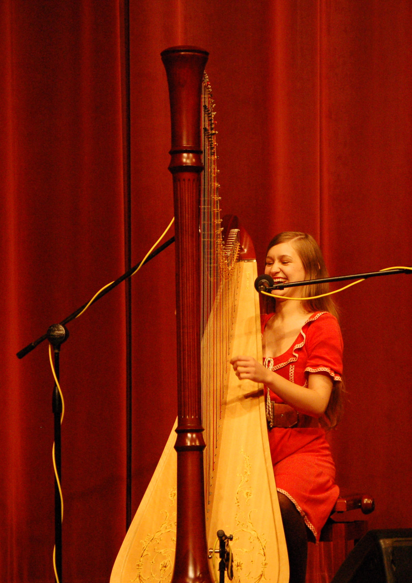 Гринсборо, 2006 год.